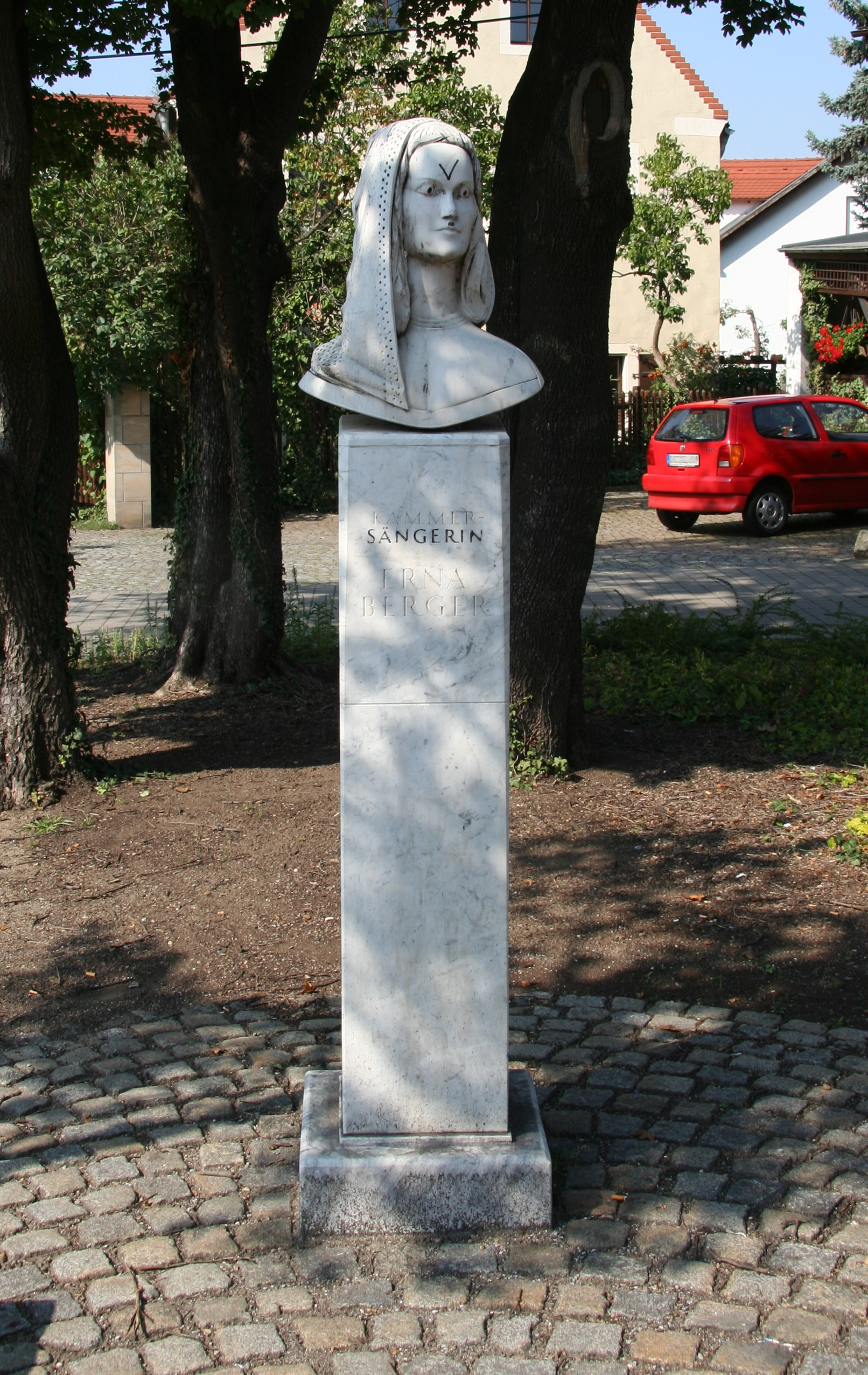 Stele von Erna Berger in Cossebaude